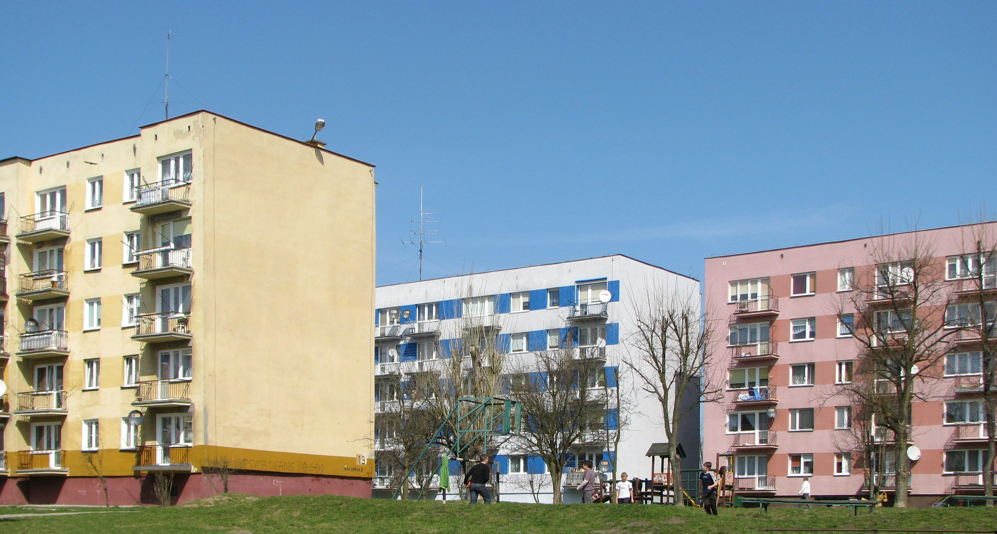 Osiedle Północ w Staszowie, Polska. Wielorodzinna zabudowa mieszkaniowa, widok z ul. Jana Pawła II.